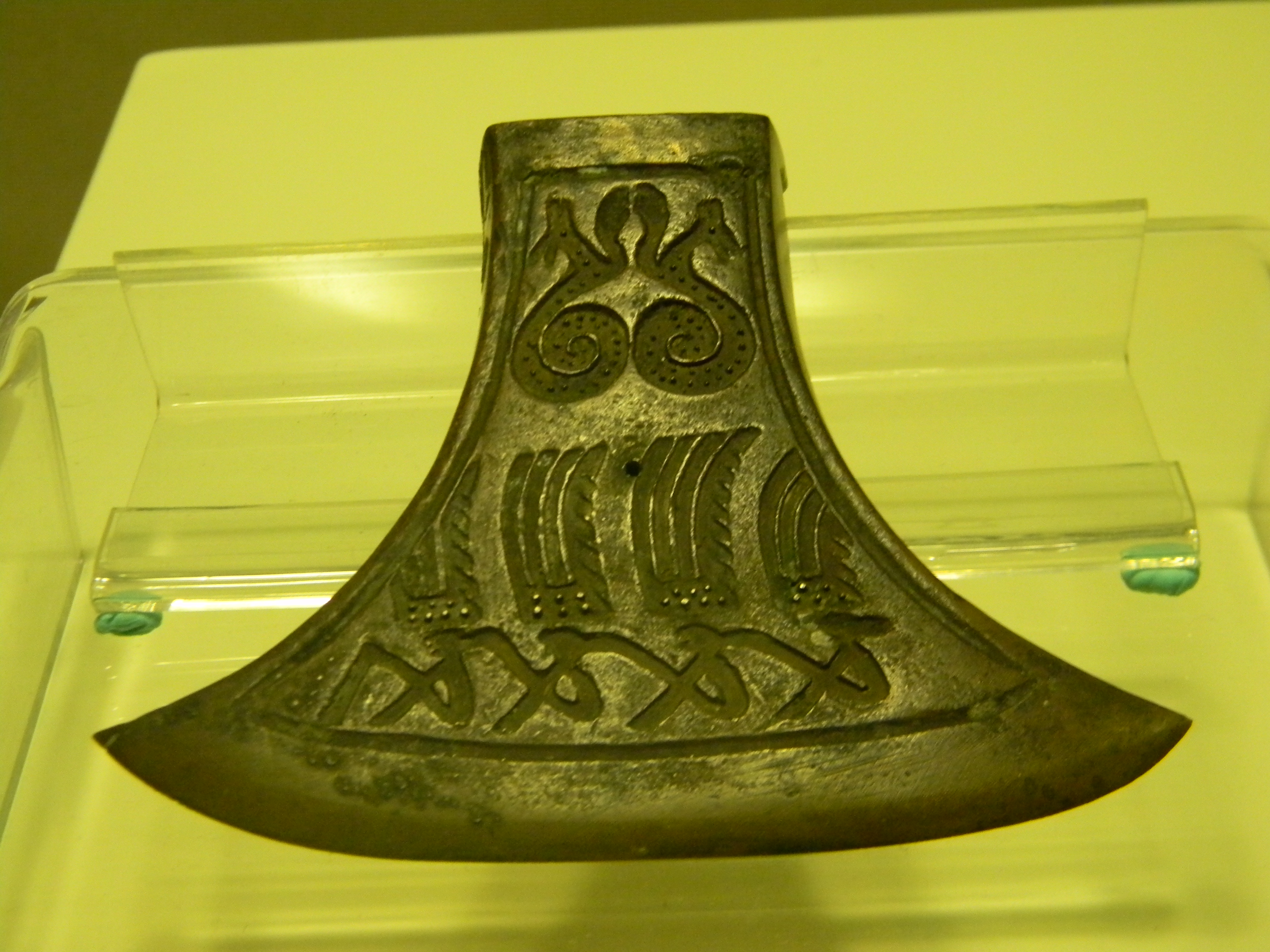 铜钺，战国（前475-前221）,1976年鄞县云龙镇甲村石秃山出土，宁波博物馆收藏，斧形,中空、单面刃。单面通体阴刻，边框线内上方是两条相向的龙，下部边框底线表示轻舟，内坐四人，头戴羽冠，双手奋力划船。